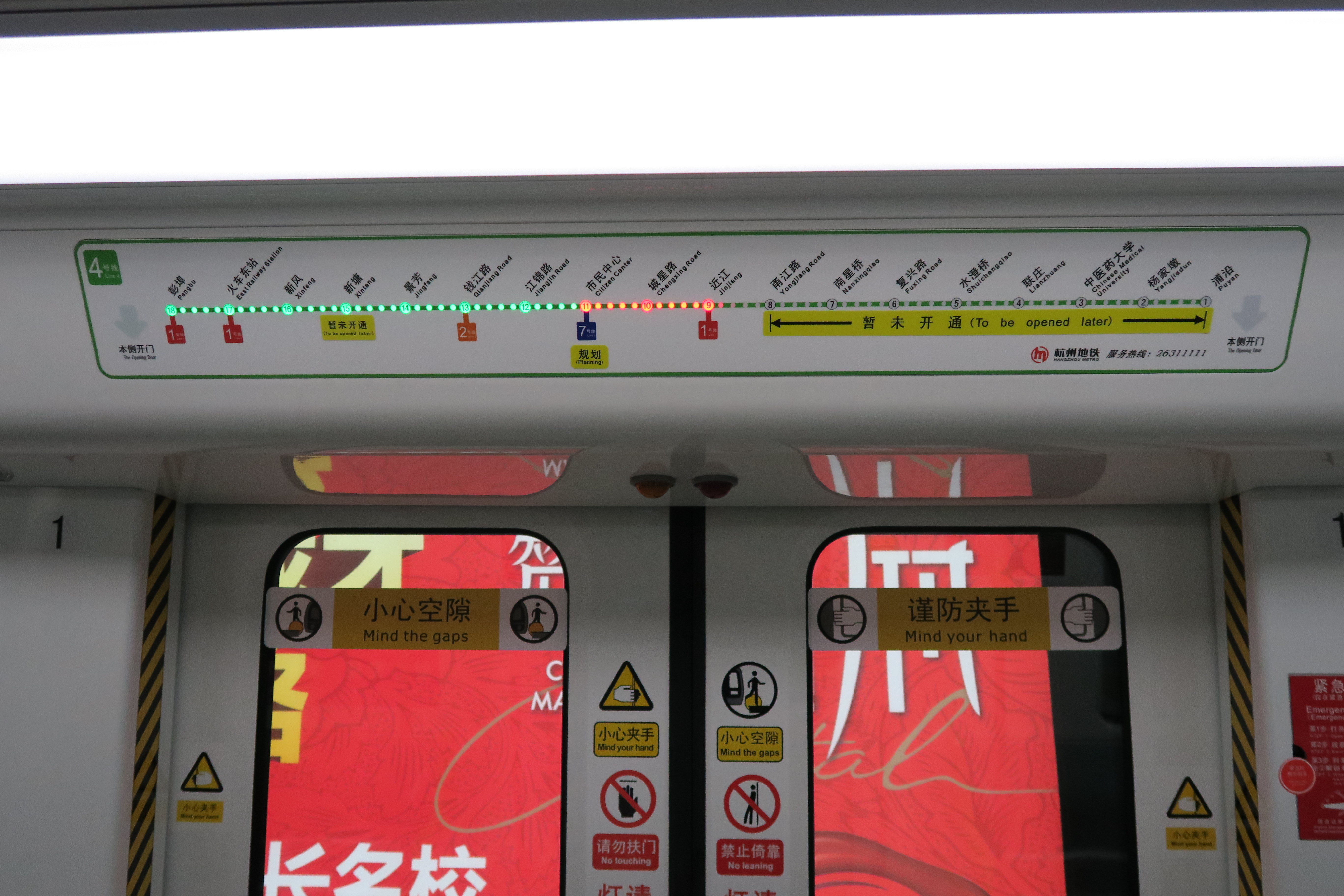 杭州地铁4号线列车闪灯图